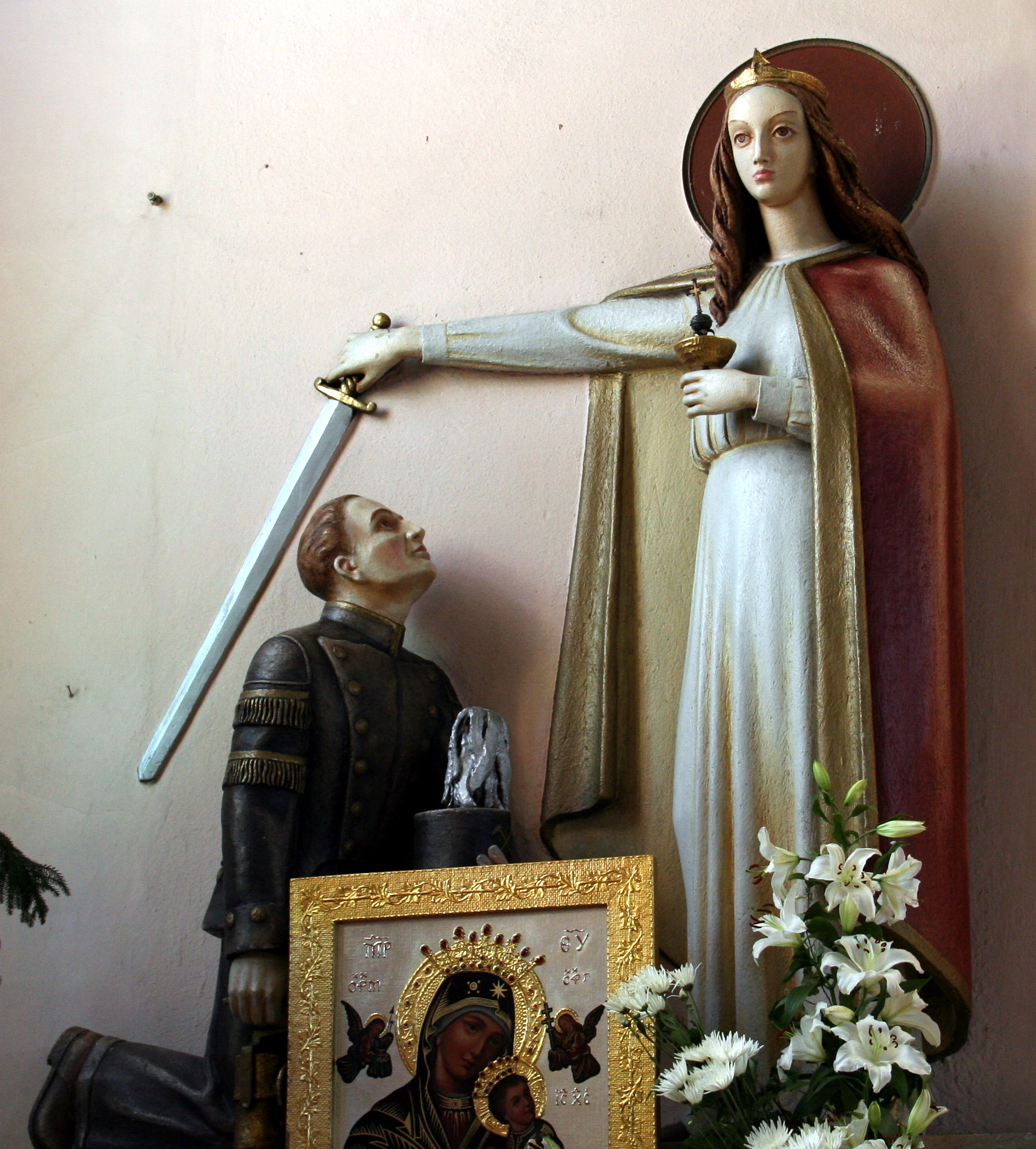 Figura świętej Barbary błogosławiącej górnikowi w kościele Matki Boskiej Szkaplerznej w Jejkowicach